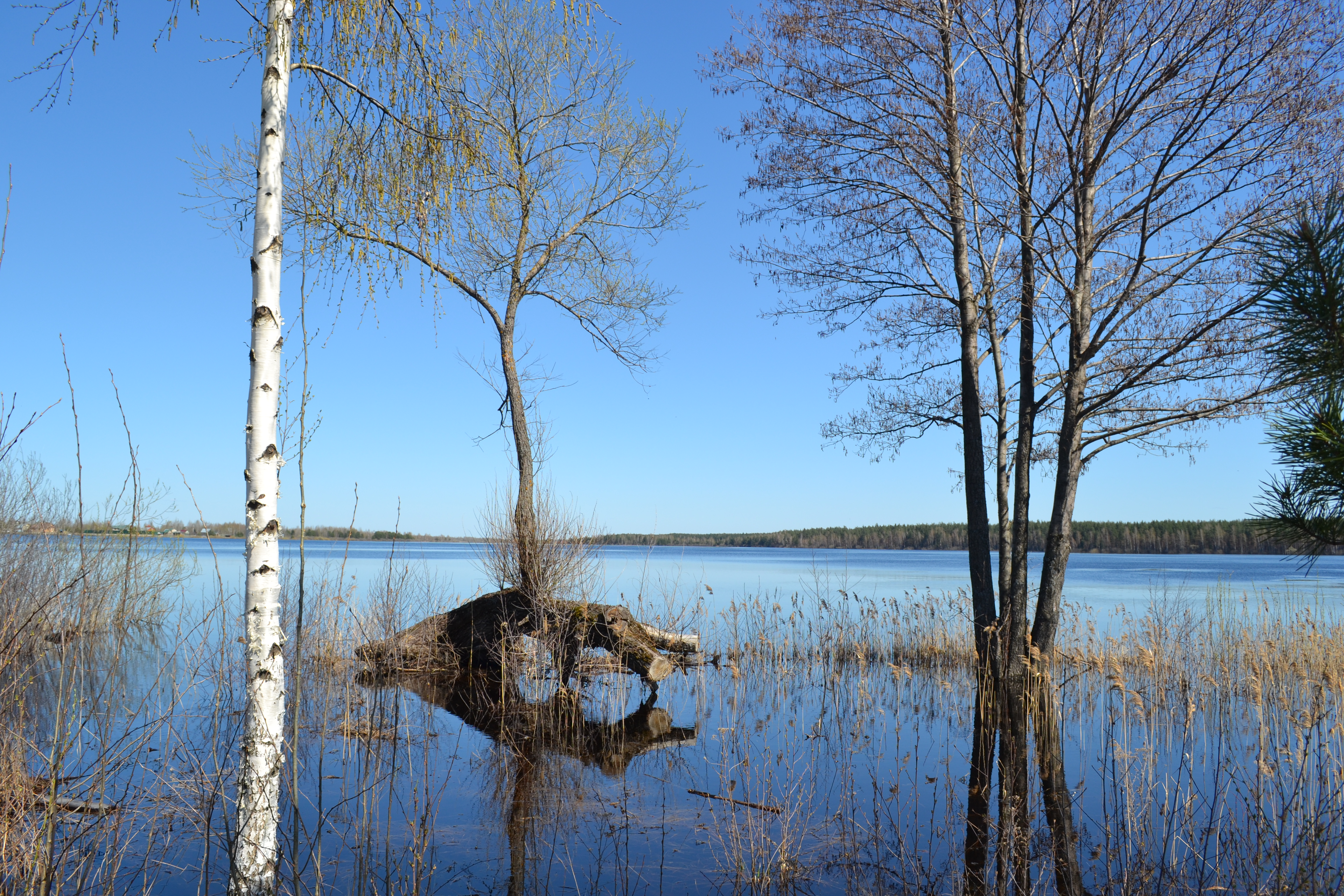 Святое (Филисовский плёс), деревня Филисово, Шатурский район